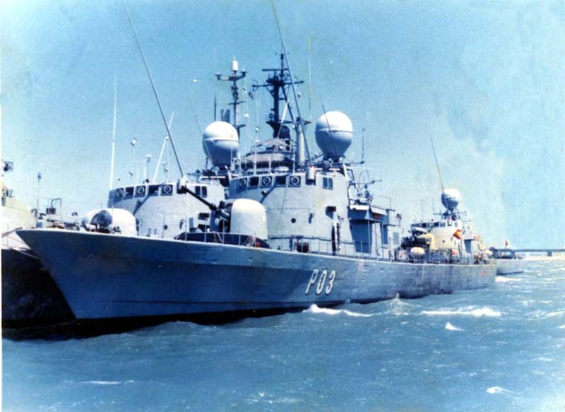 Patrullero de la Armada española Cadarso; transferido a Colombia en 1997 con el nombre ARC Jorge E. Márquez Durán